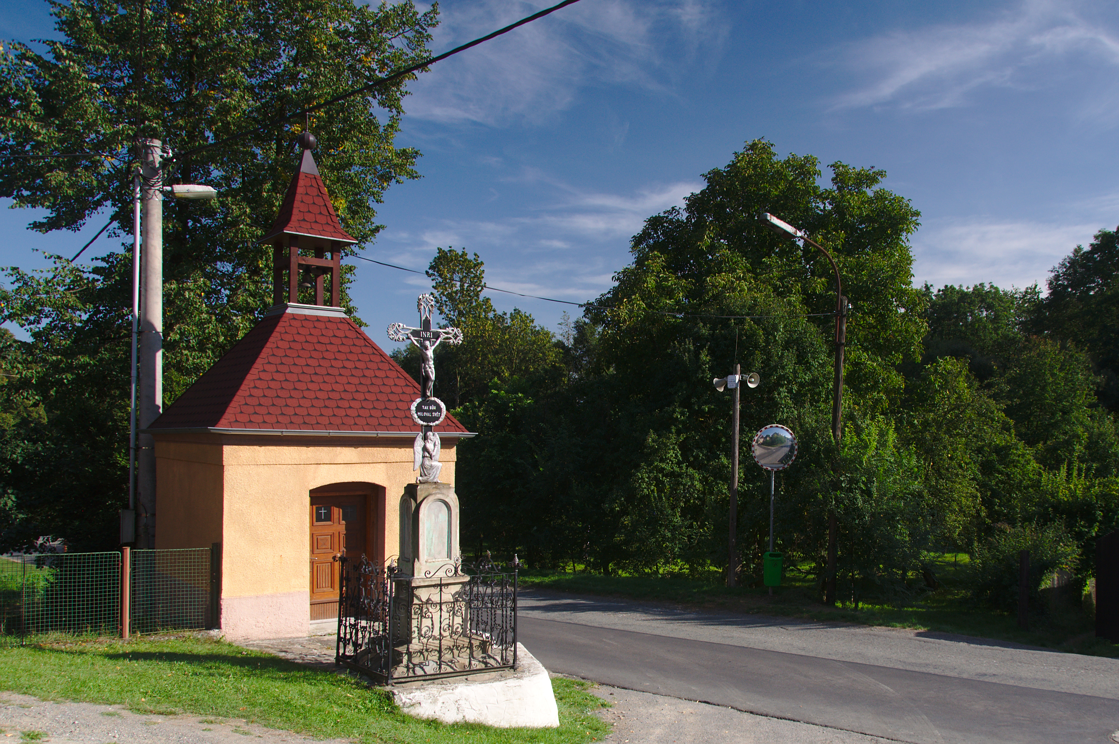 Kaple, Ptenský Dvorek, Ptení, okres Prostějov